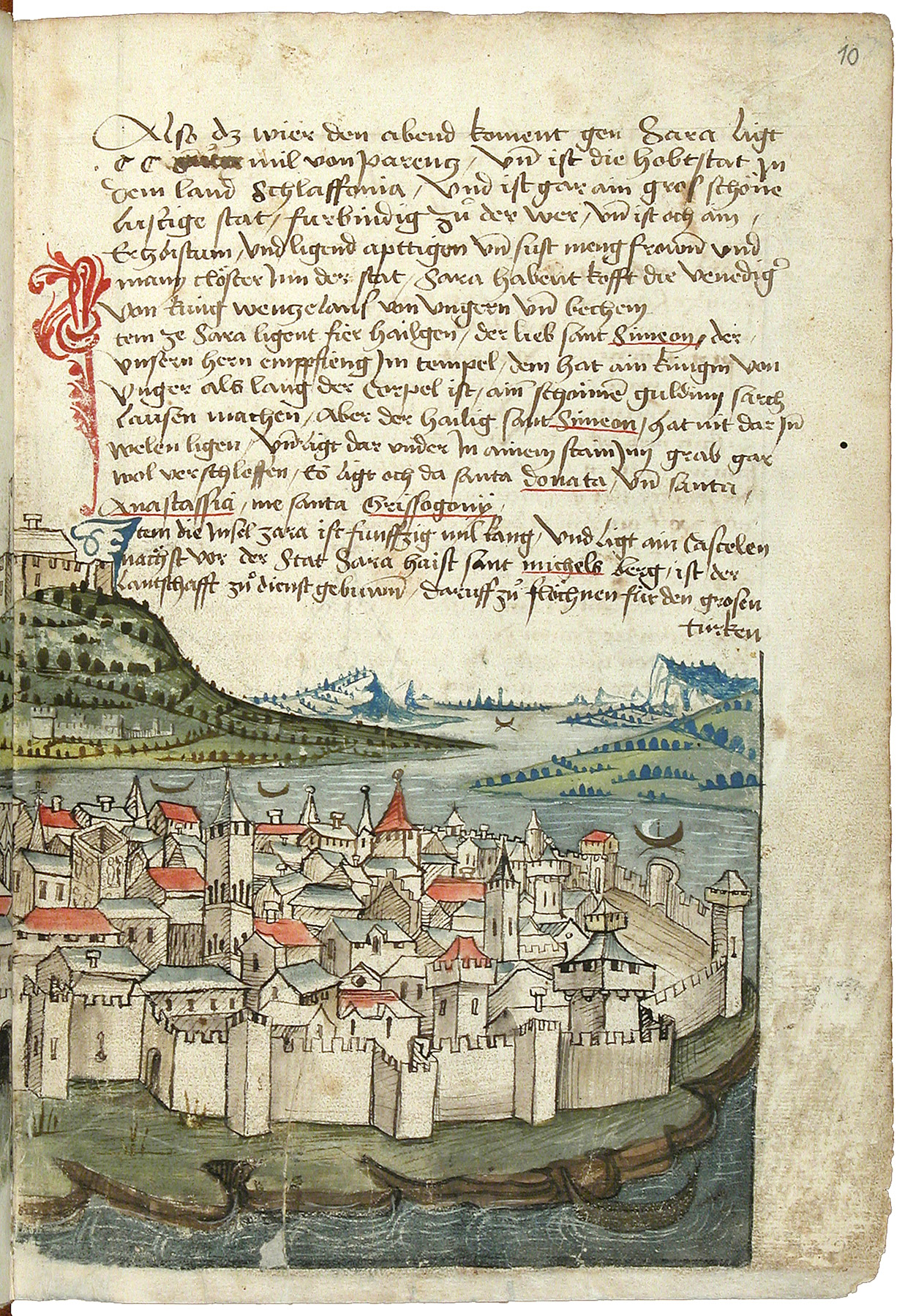 Zadar. Schilderung einer Pilgerreise von Konstanz nach Jerusalem durch Konrad von Grünenberg, um 1487 Konrad von Grünenberg: Beschreibung der Reise von Konstanz nach Jerusalem - Cod. St. Peter, pap. 32. Handschrift, Bodenseegebiet (Konstanz?), um 1487. II + 53 Blätter, 32x21, mit 31 kolorierten Zeichnungen der Reiseroute von Venedig bis Palästina. Text in alemannischer Mundart.